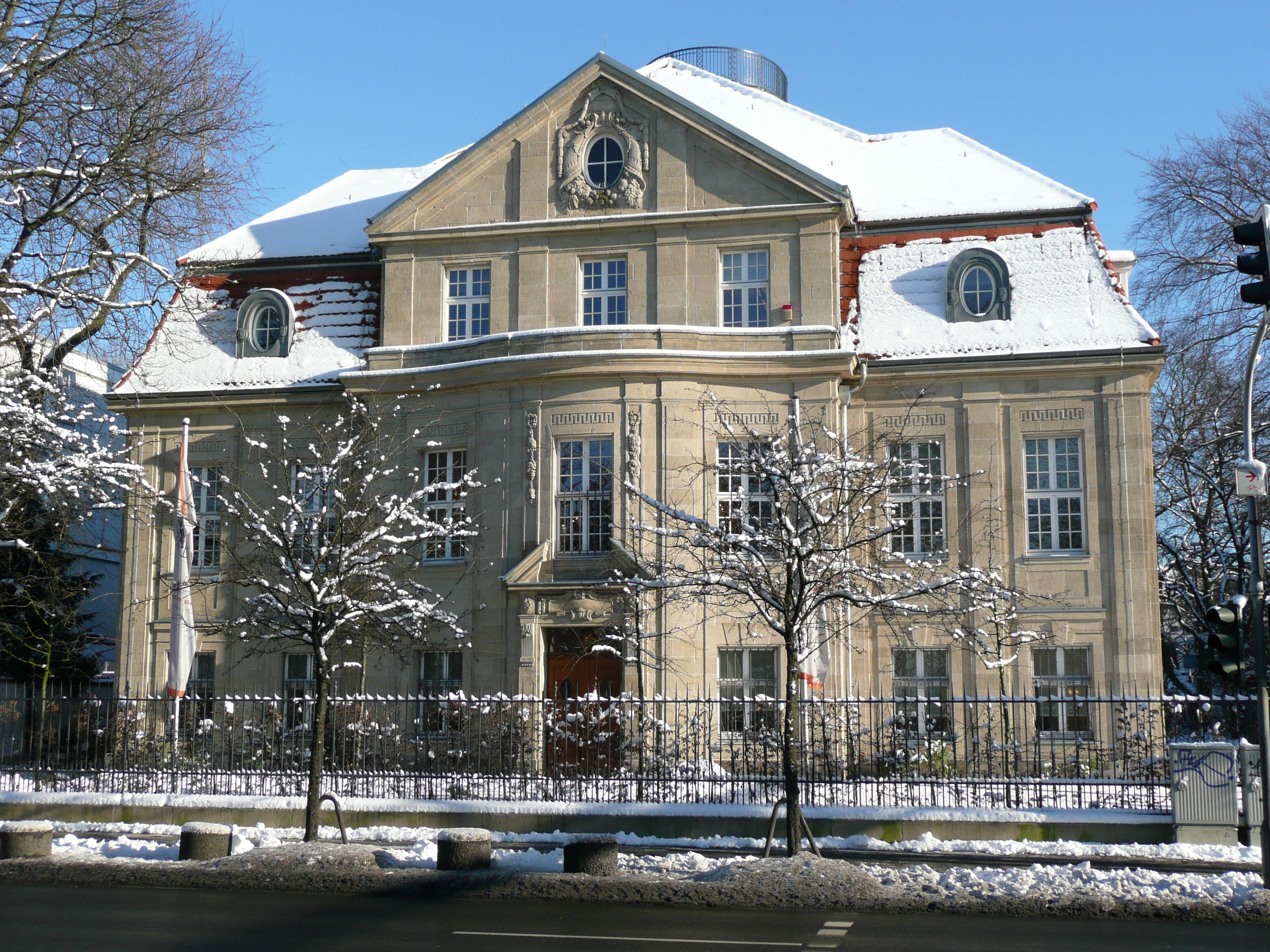 Düsseldorfer Niederlassung der Berenberg Bank in der Cecilienallee